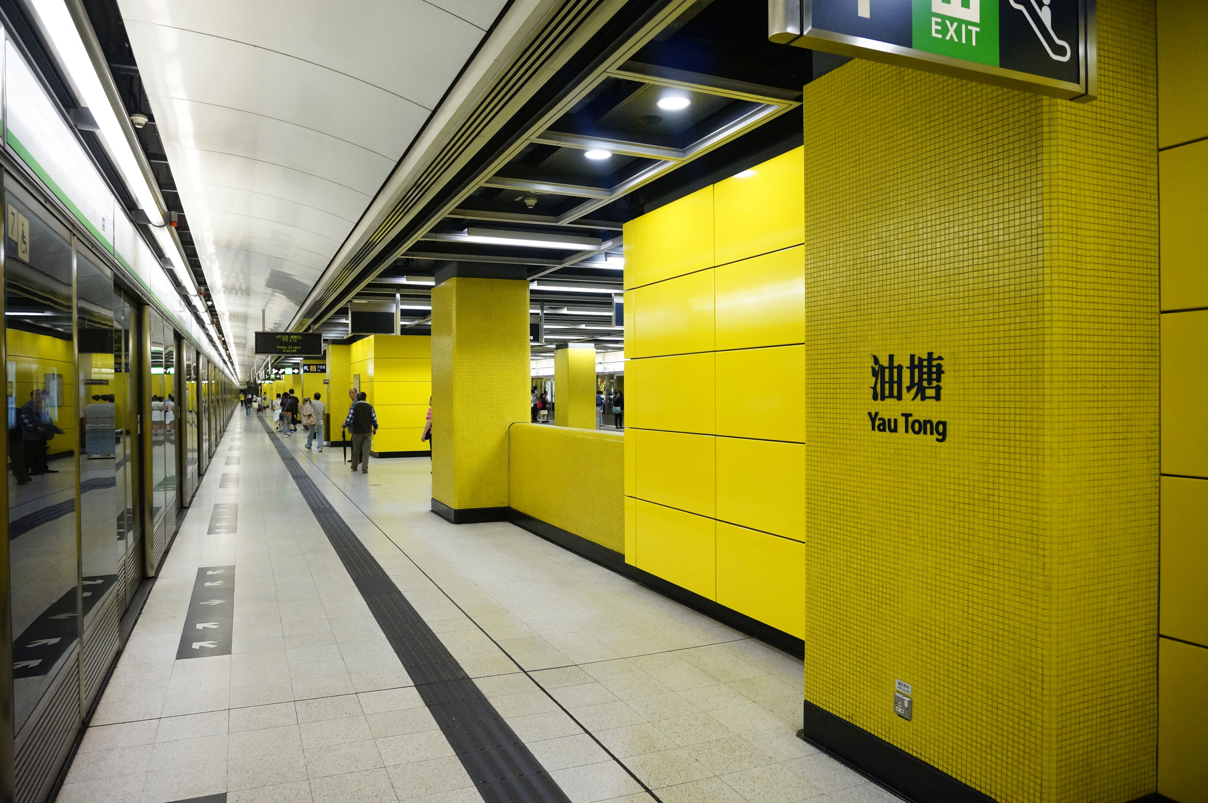 港鐵油塘站月台